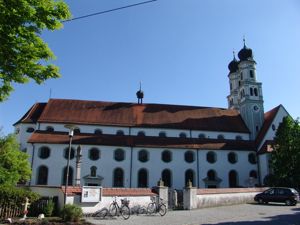 Die ehemalige Klosterkirche und heutige Pfarrkirche "Mariä Himmelfahrt" in Niederschönenfeld